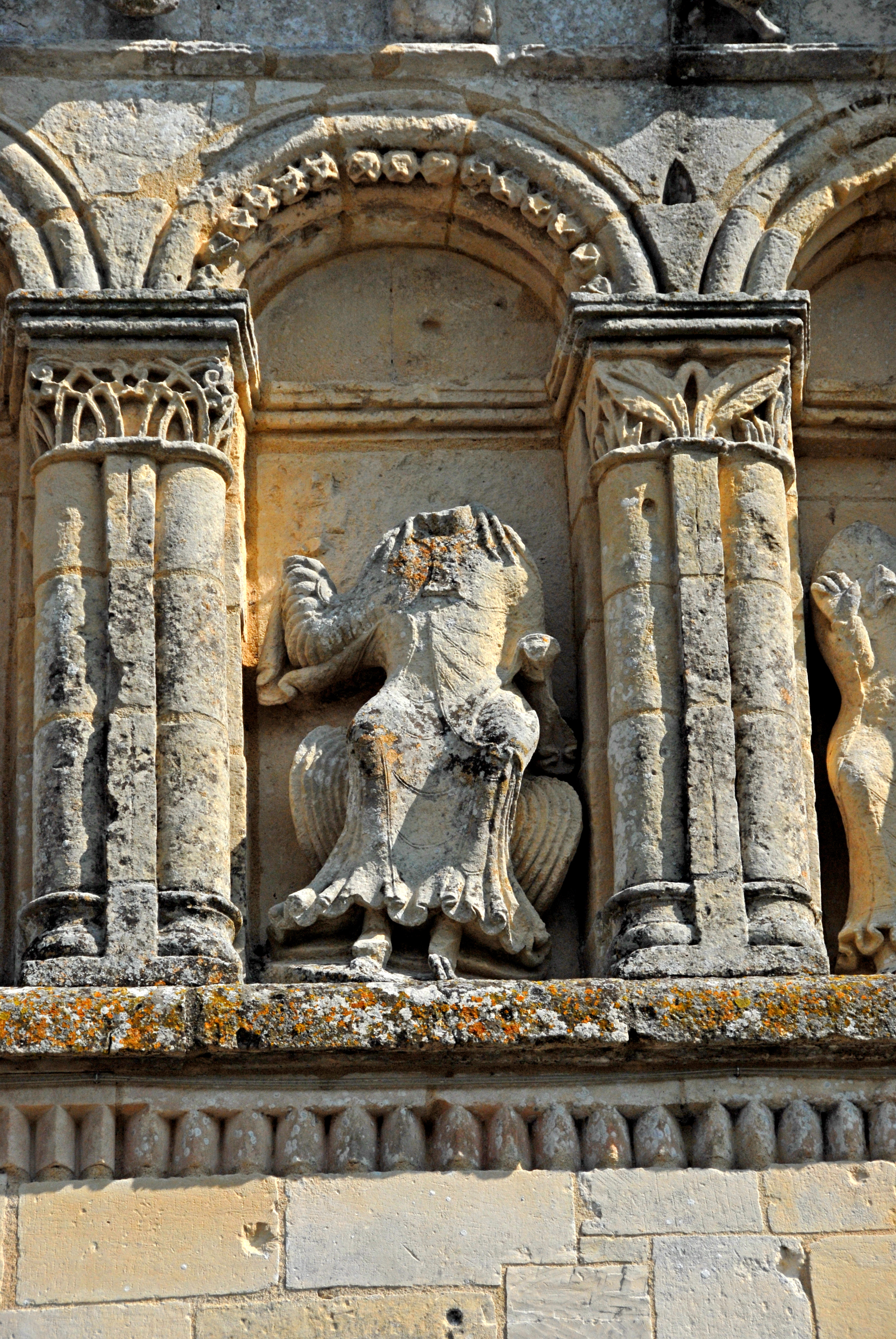 Pfarrkirche Saint-Pierre-de-Pérignac, Muttergottes